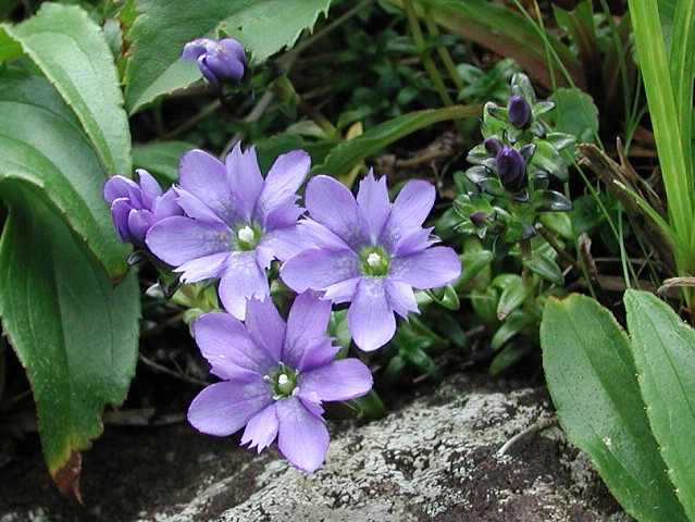 ミヤマリンドウ (山形県月山) Gentiana nipponica (Mt.Gassan, Yamagata, Japan)